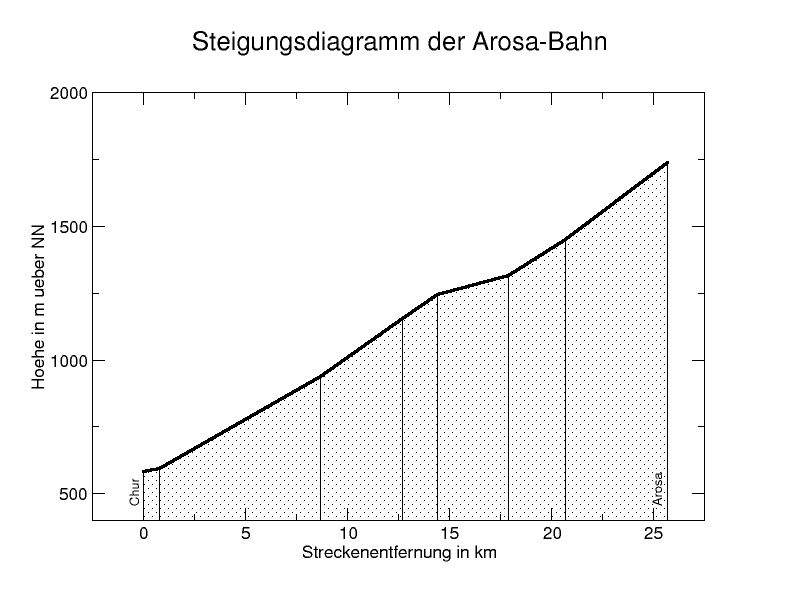 Steigungsdiagramm der Chur-Arosabahn der Rhätische Bahn